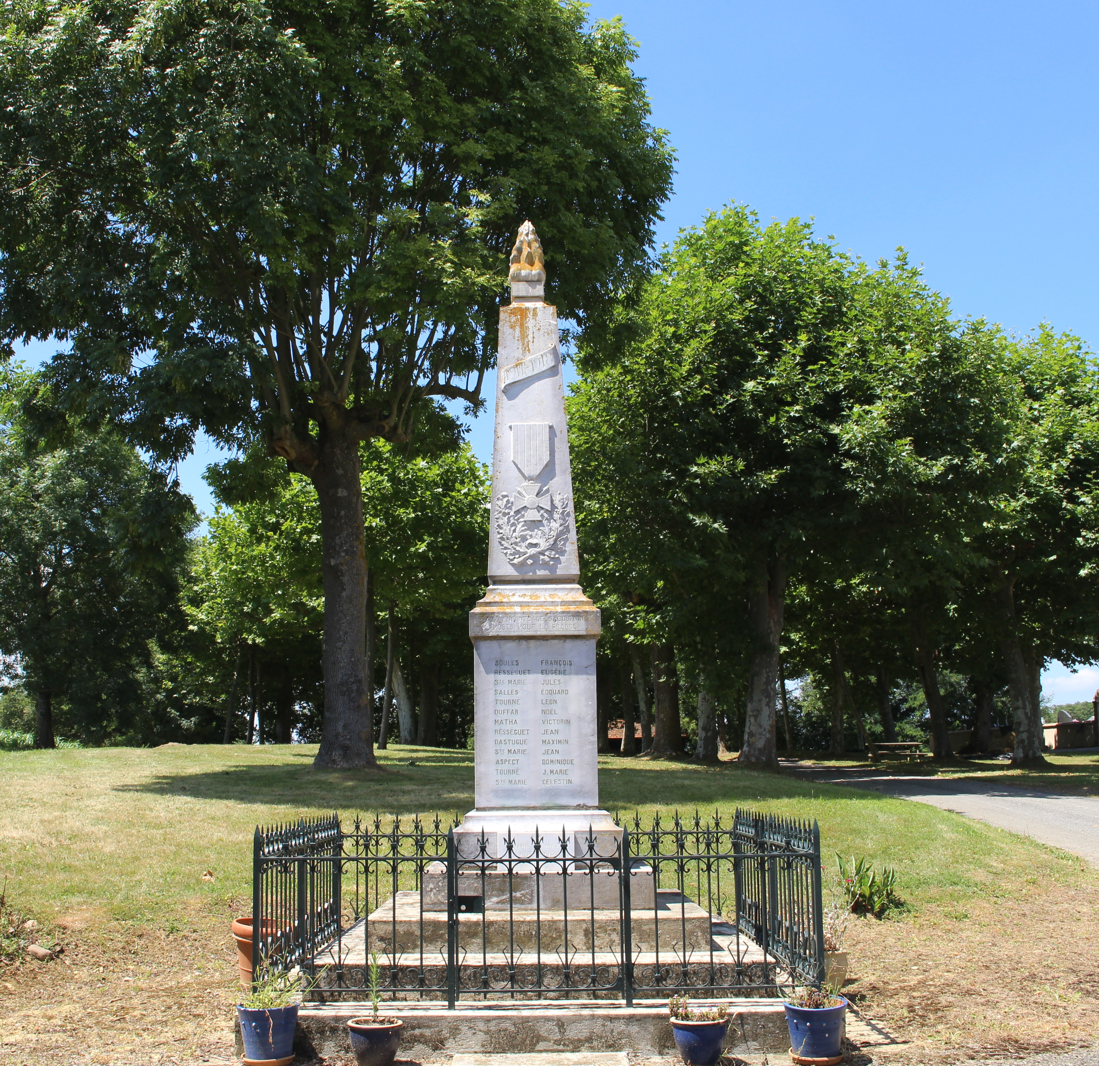 Monument aux morts de Sadournin (Hautes-Pyrénées)